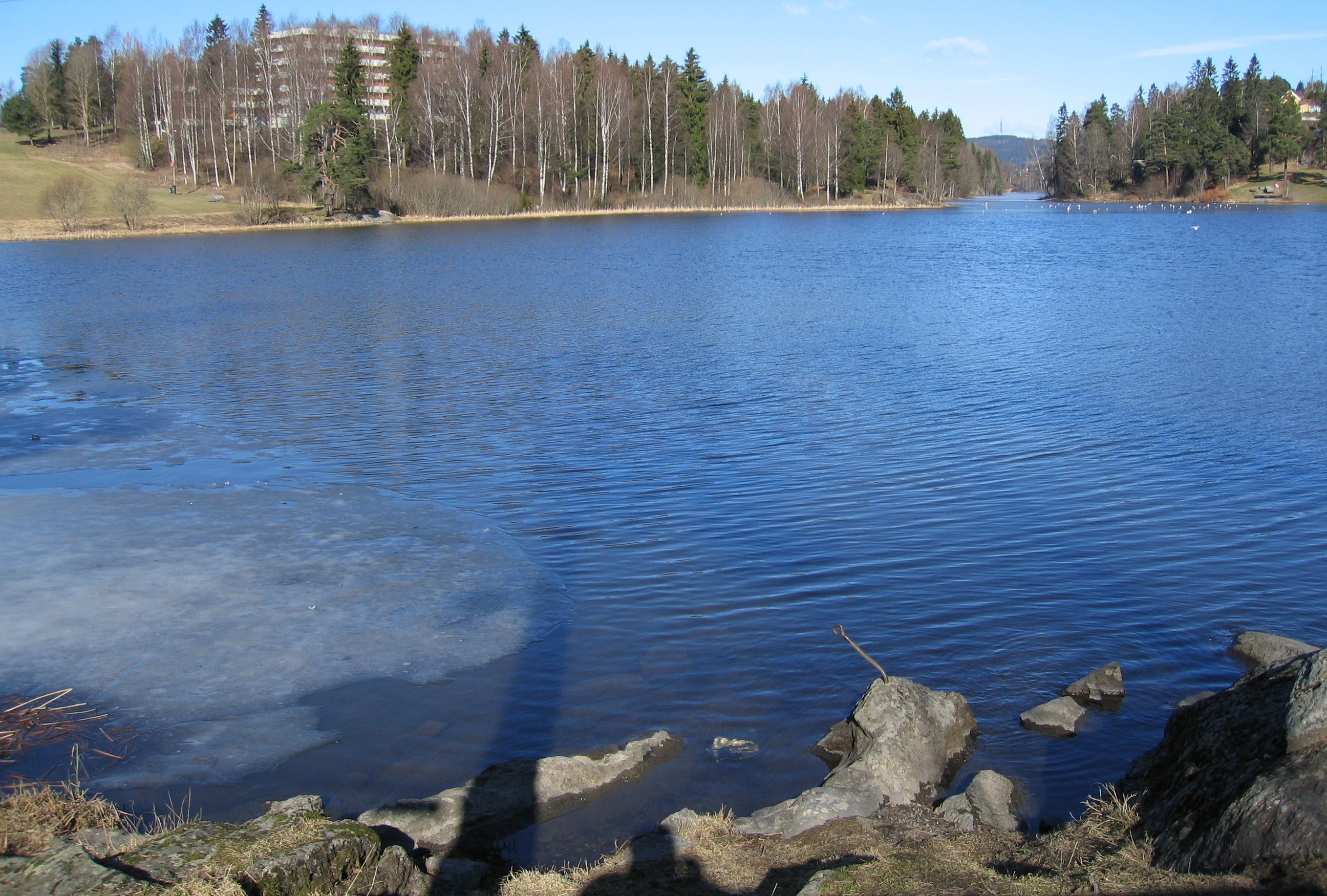 Foto av Langvannet i Lørenskog, tatt fra Knatten mot Lørenskog rådhus, på Kjenn